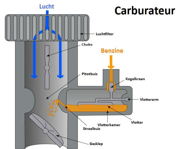 Basisonderdelen van een carburateur.